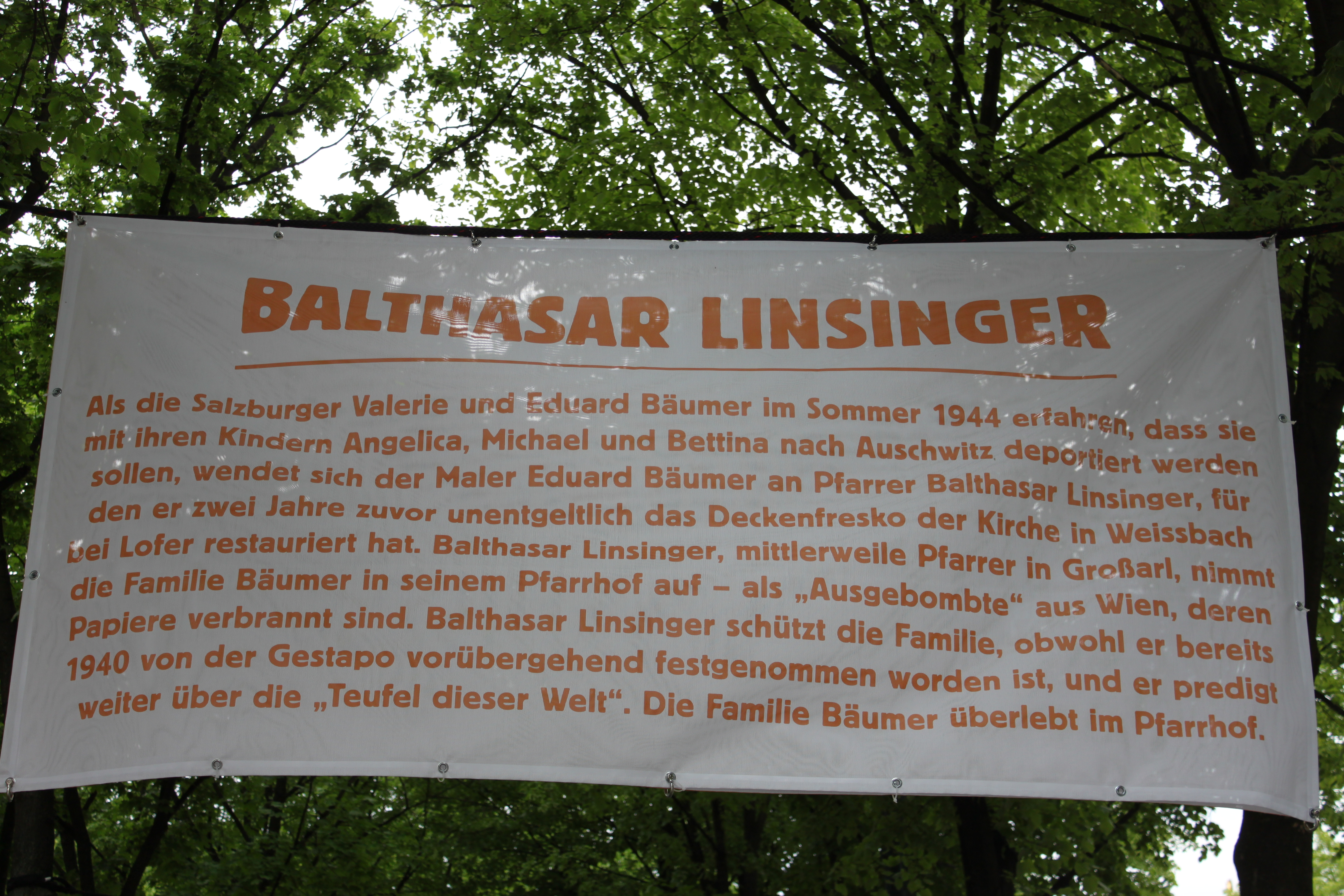 Aktion von in Wien, von der Oper bis zum Burgtheater, April bis Mai 2011